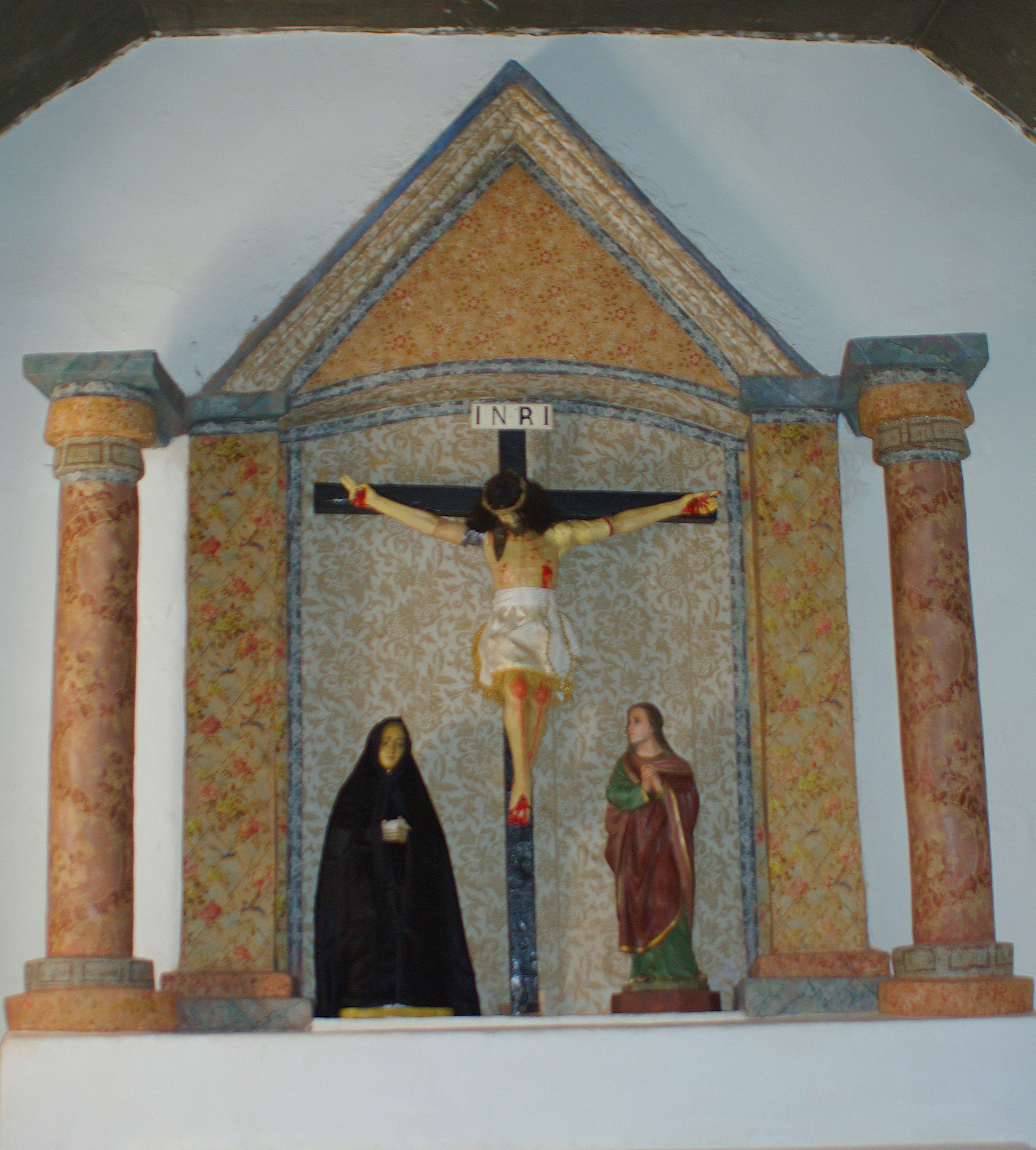 Detalle del interior de la iglesia de San Pedro, San Pedro de Atacama, abril de 2010